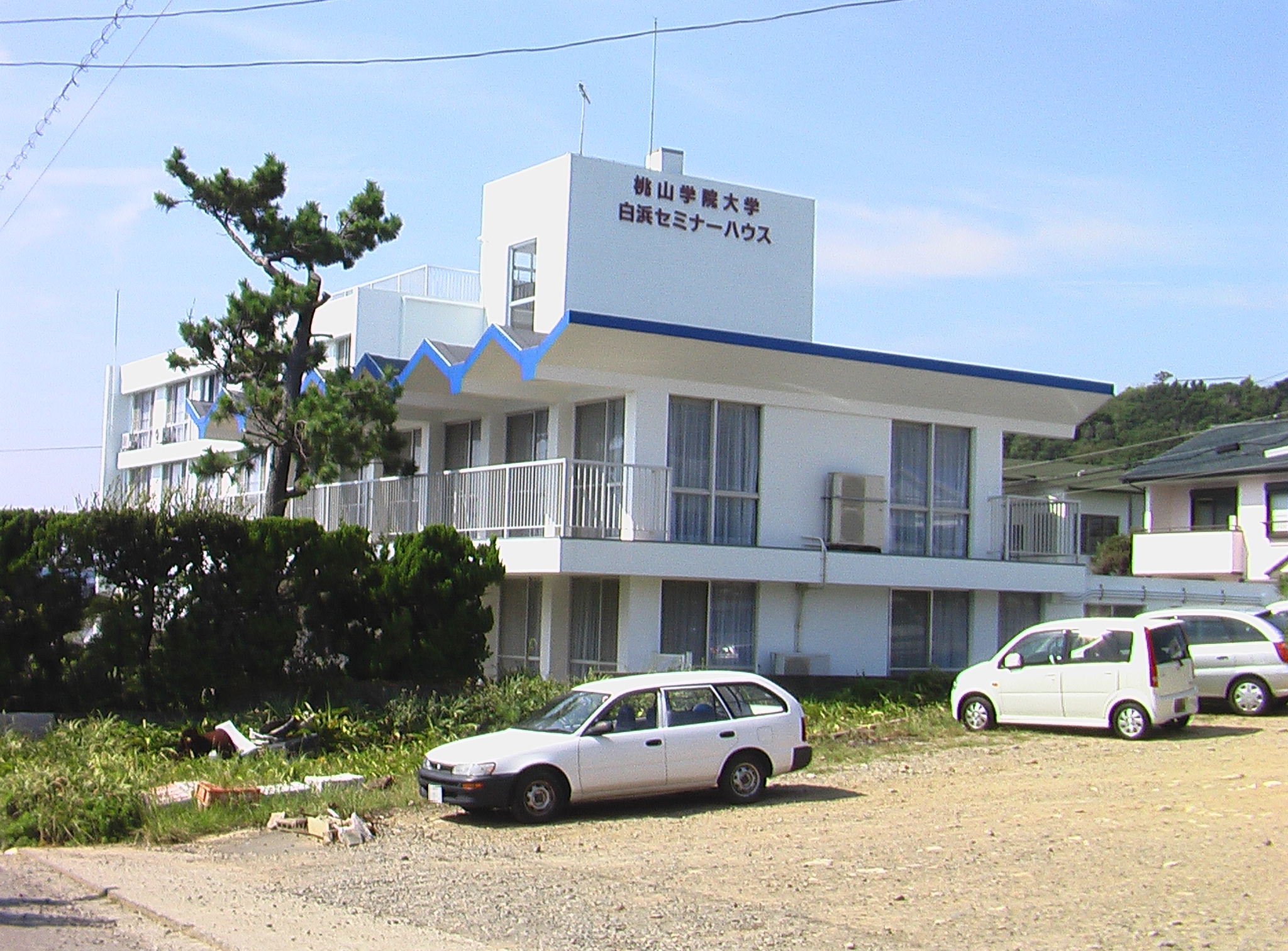 投稿者自身が『桃山学院大学 白浜セミナーハウス』（和歌山県西牟婁郡白浜町2927-1813）を撮影。 （写真に写っているすべての車両のナンバーが特定できぬよう、モザイク処理を施しております。）